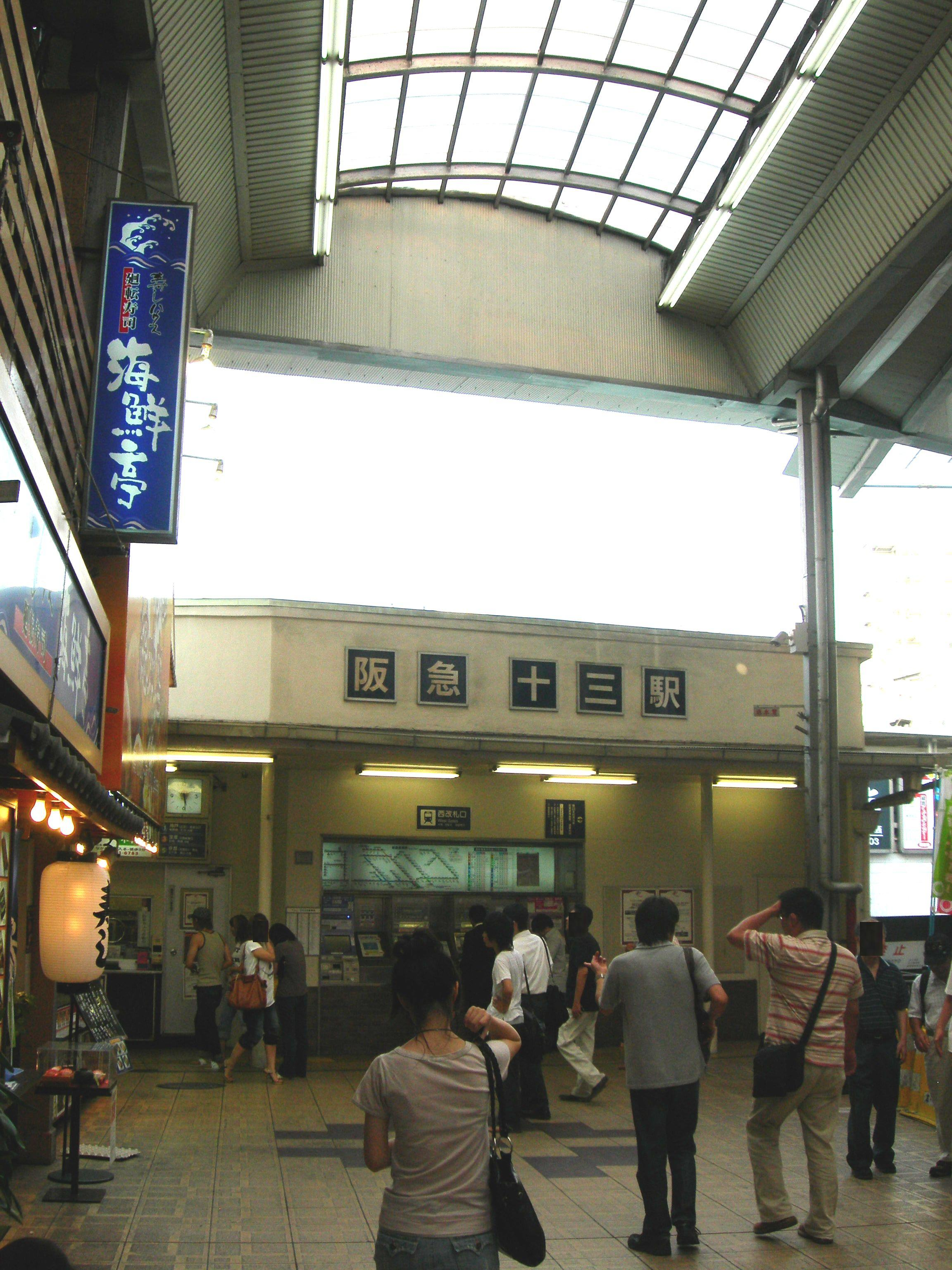 十三駅西口